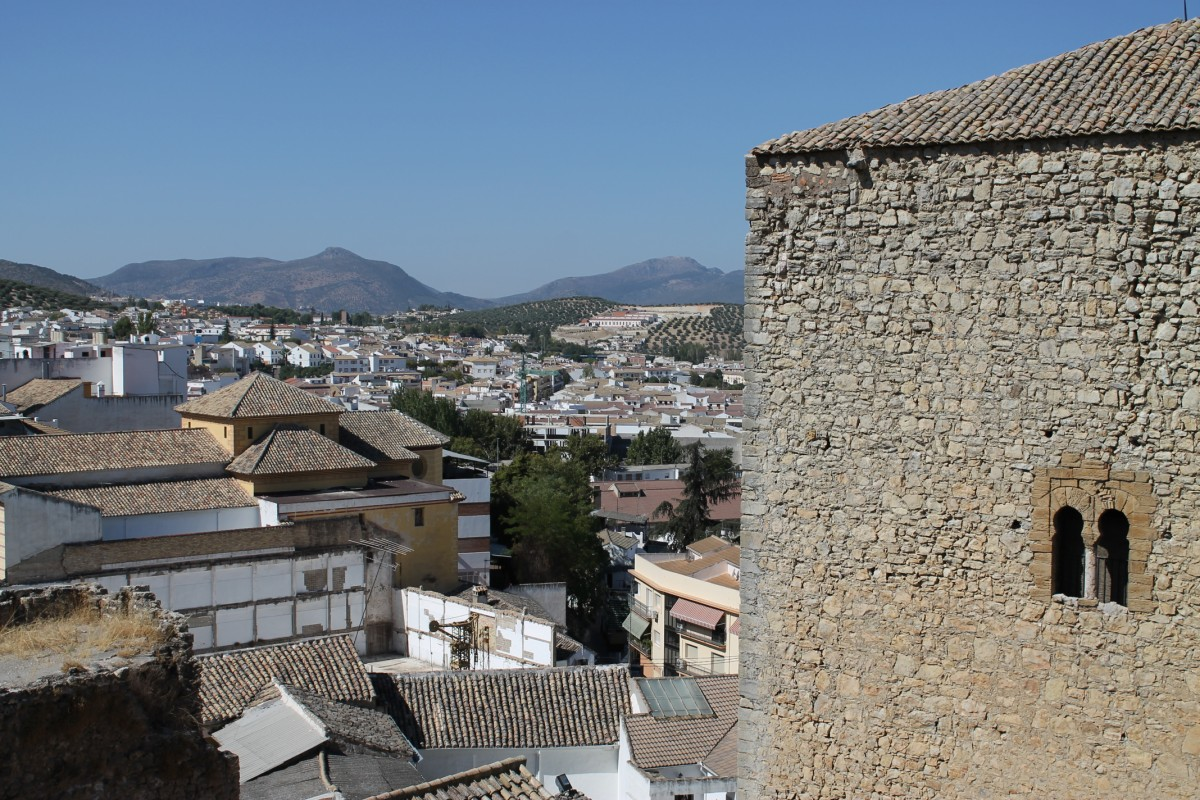 Vista de Priego de Córdoba (España).